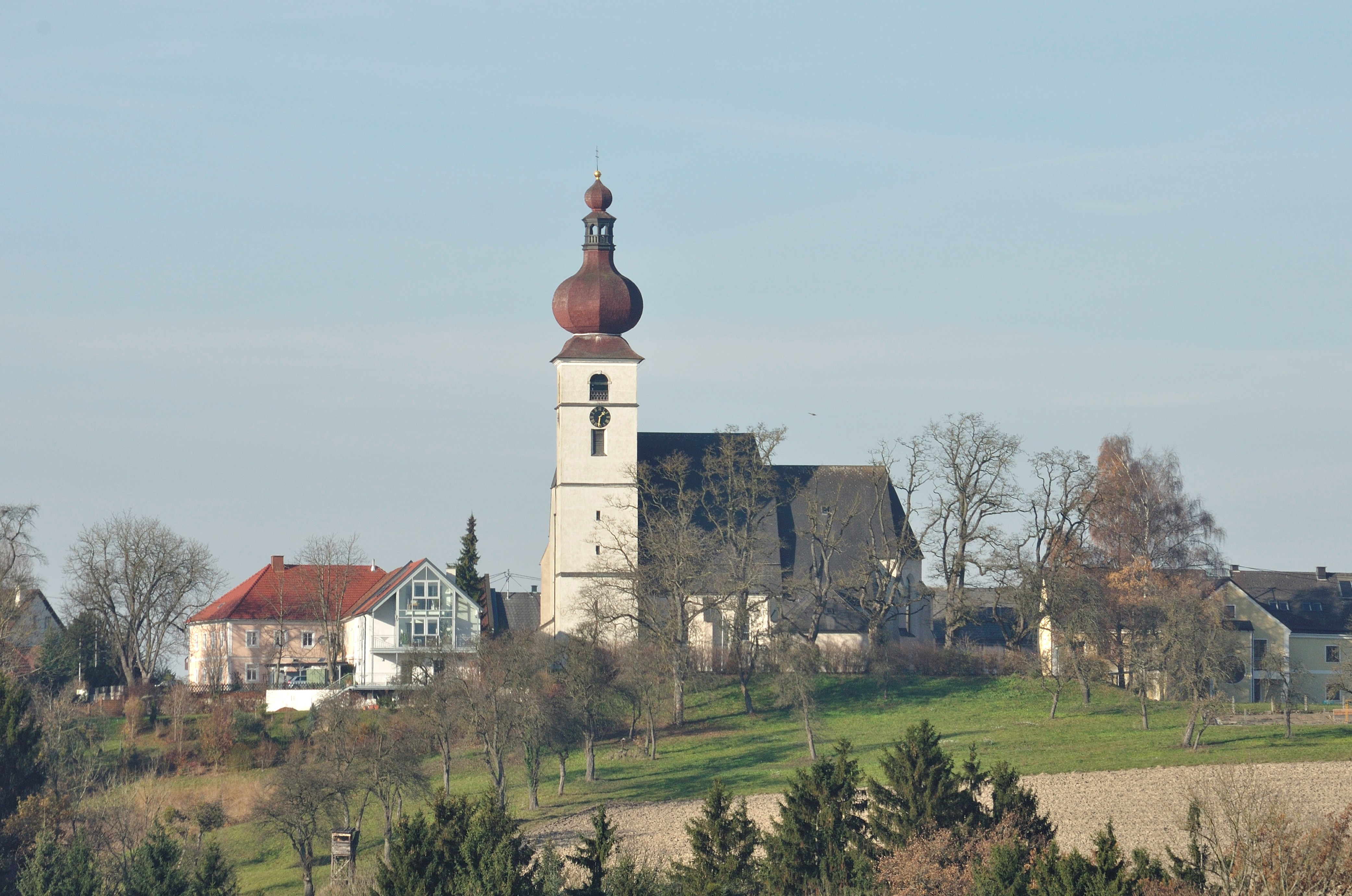 Kath. Pfarrkirche hll. Peter und Paul